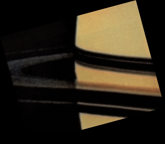 תמונה של שבתאי שצולמה על ידי פיוניר 11. התמונה עובדה על-מנת לתקן את הצבעים ולהפחית "רעש".